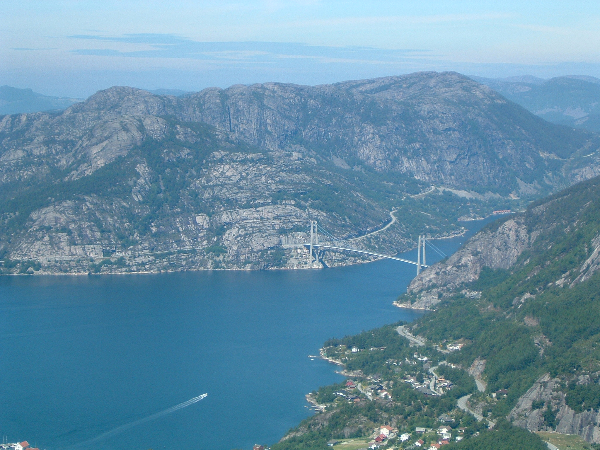 Lysefjordbrua sett fra Uburen